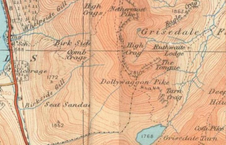 old OS map